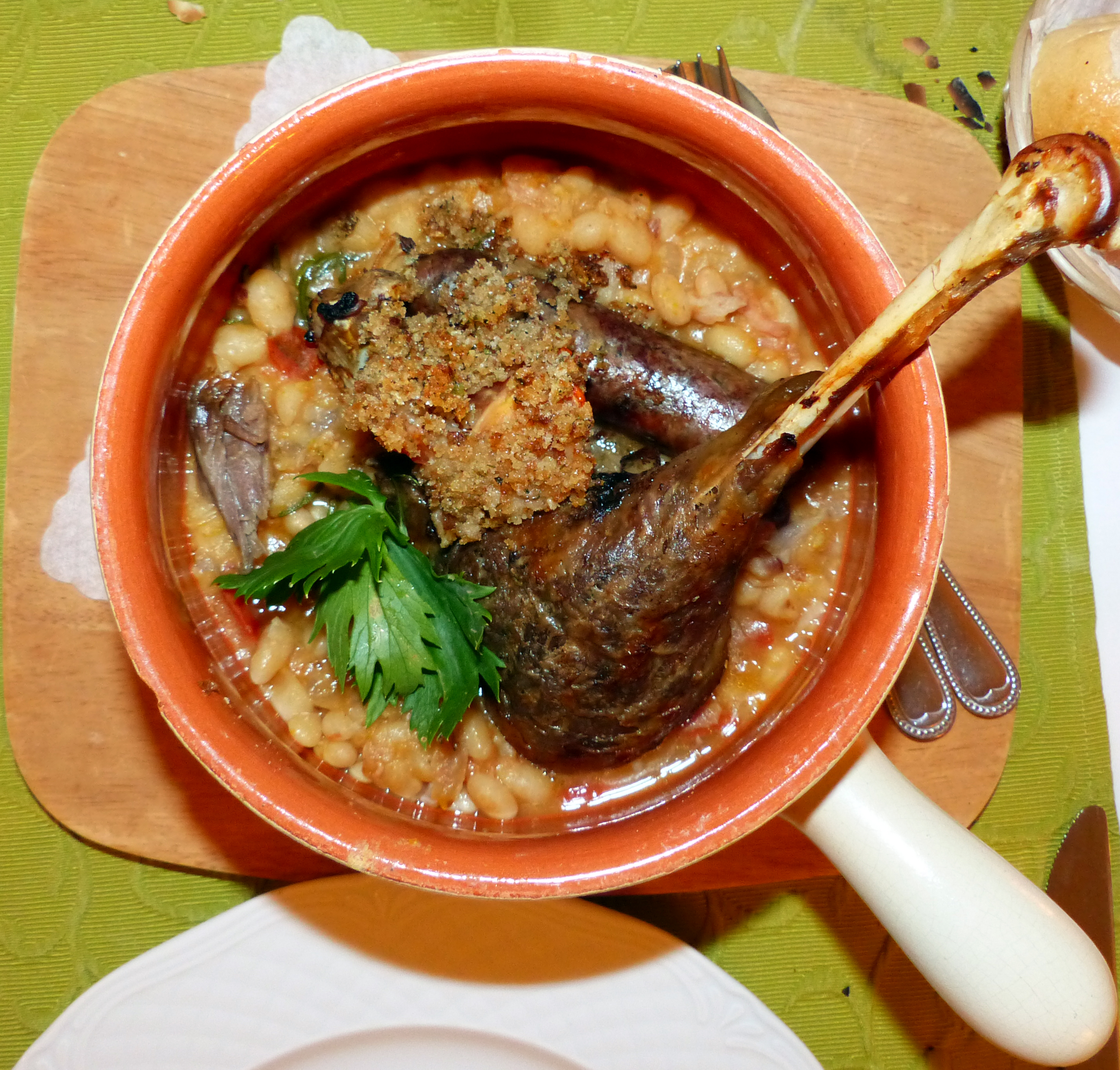 Französisches Eintopfgericht "Cassoulet" aus der Region Toulouse mit Gänsekeule, Gänsewurst und weißen Bohnen. Französisches Restaurant "Auberge Gutshof" in Bischofswerda, Sachsen, Deutschland